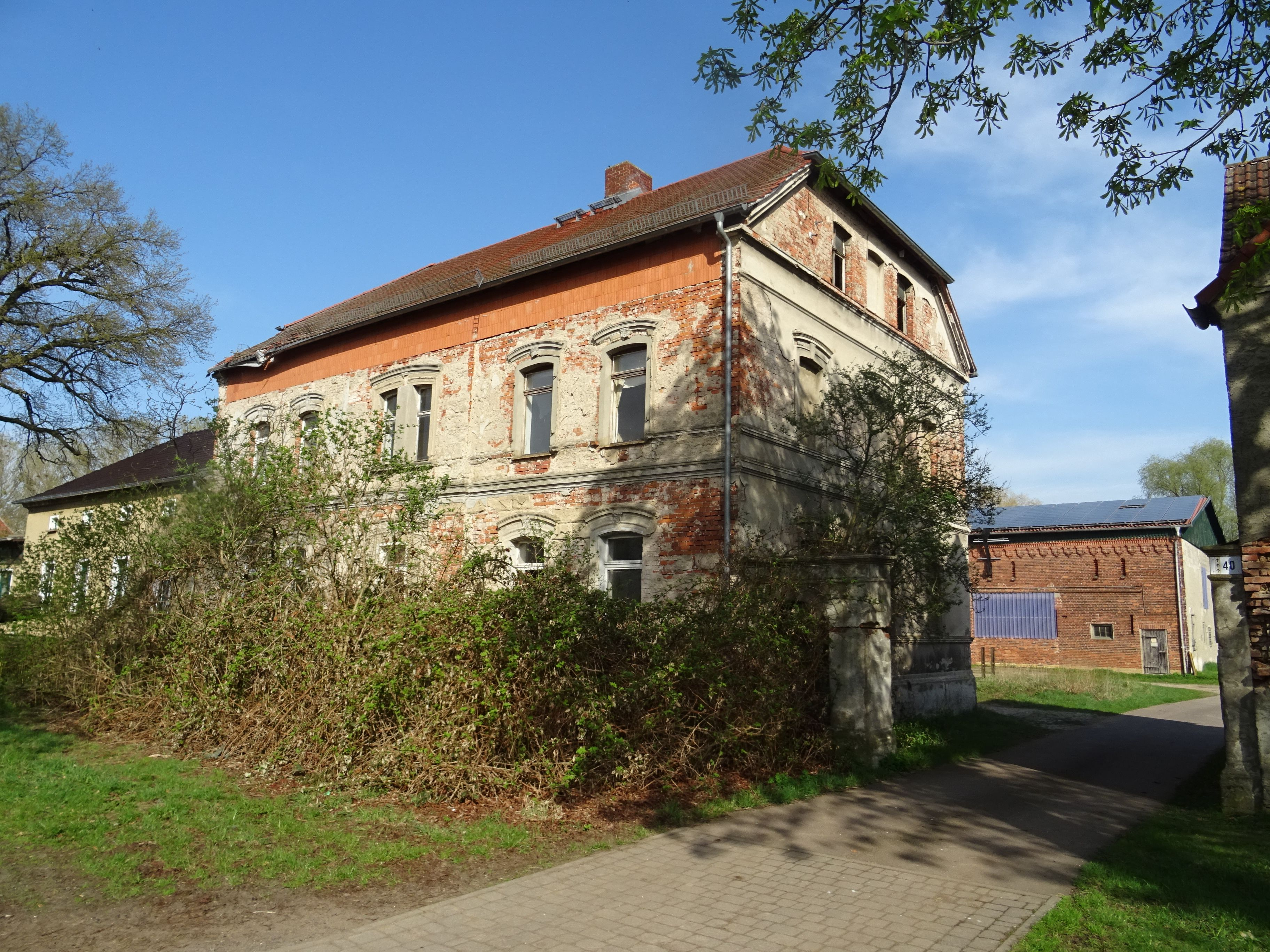 Bösewig, Gutshaus östlich der Dorfstraße (Nr 38-41), denkmalgeschützt